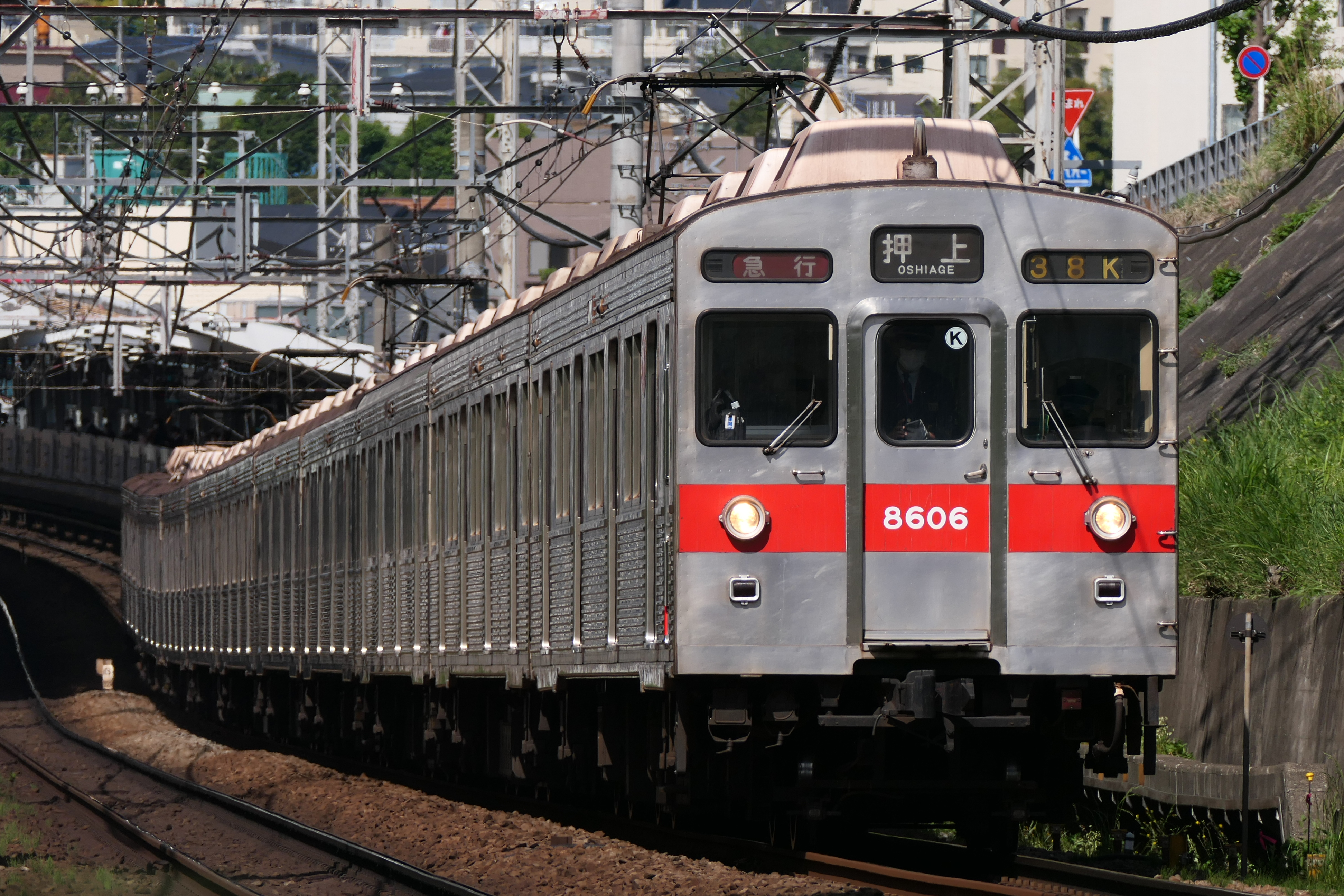 東急田園都市線を走行する8500系8606編成